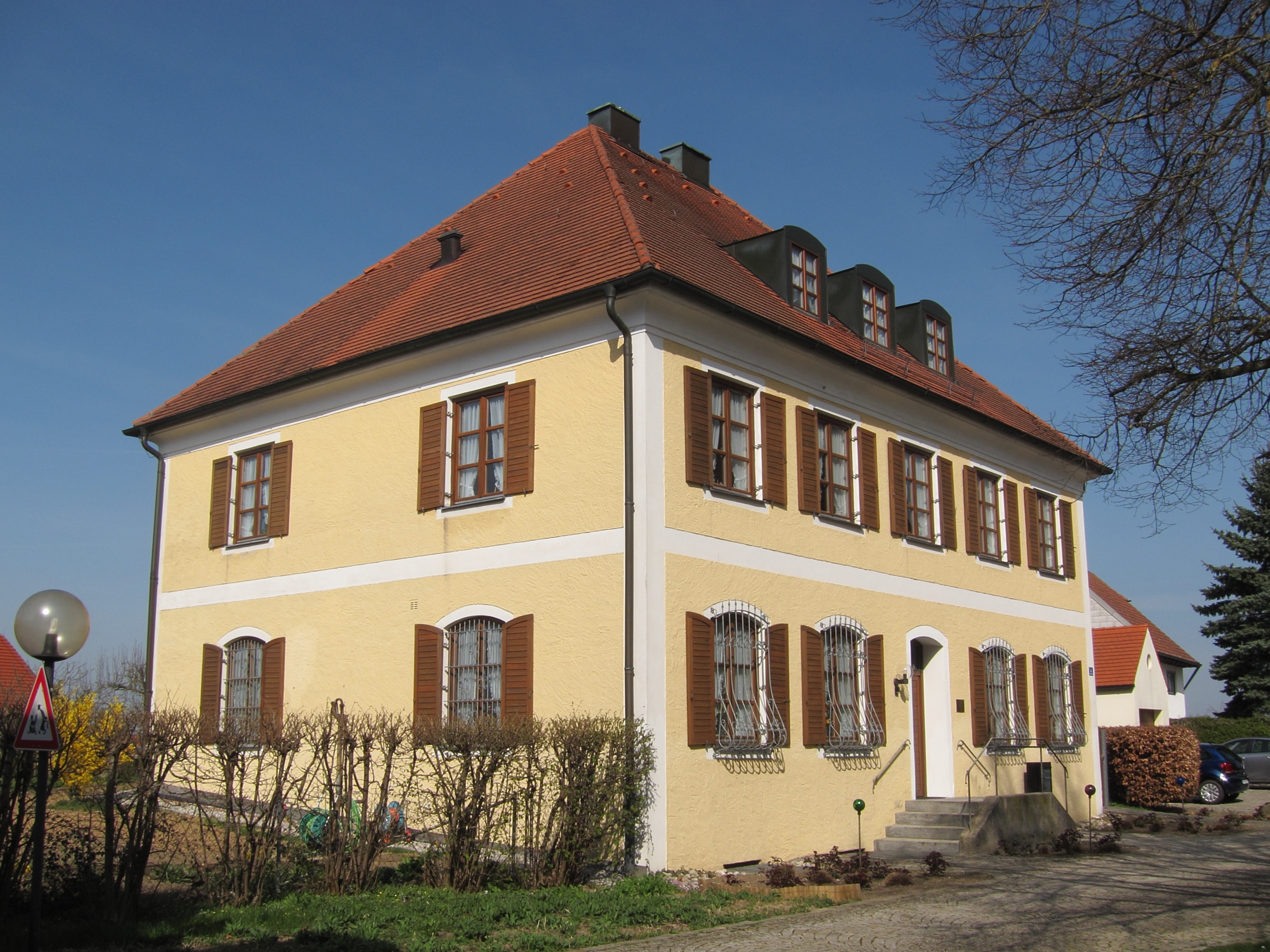 Pfarrhaus, zweigeschossiger, verputzter Walmdachbau, 18. Jahrhundert